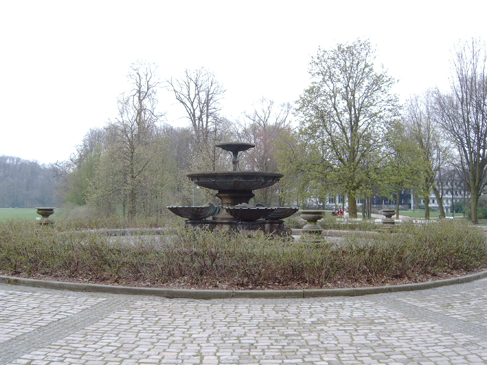 Marcusbrunnen Design by William Benque Dr. Victor Marcus donated the Money 1959 Das abgebildete Objekt ist ein geschütztes Kulturdenkmal in der Freien Hansestadt Bremen, mit der Nr. 0218,T032 beim Landesamt für Denkmalpflege registriert.